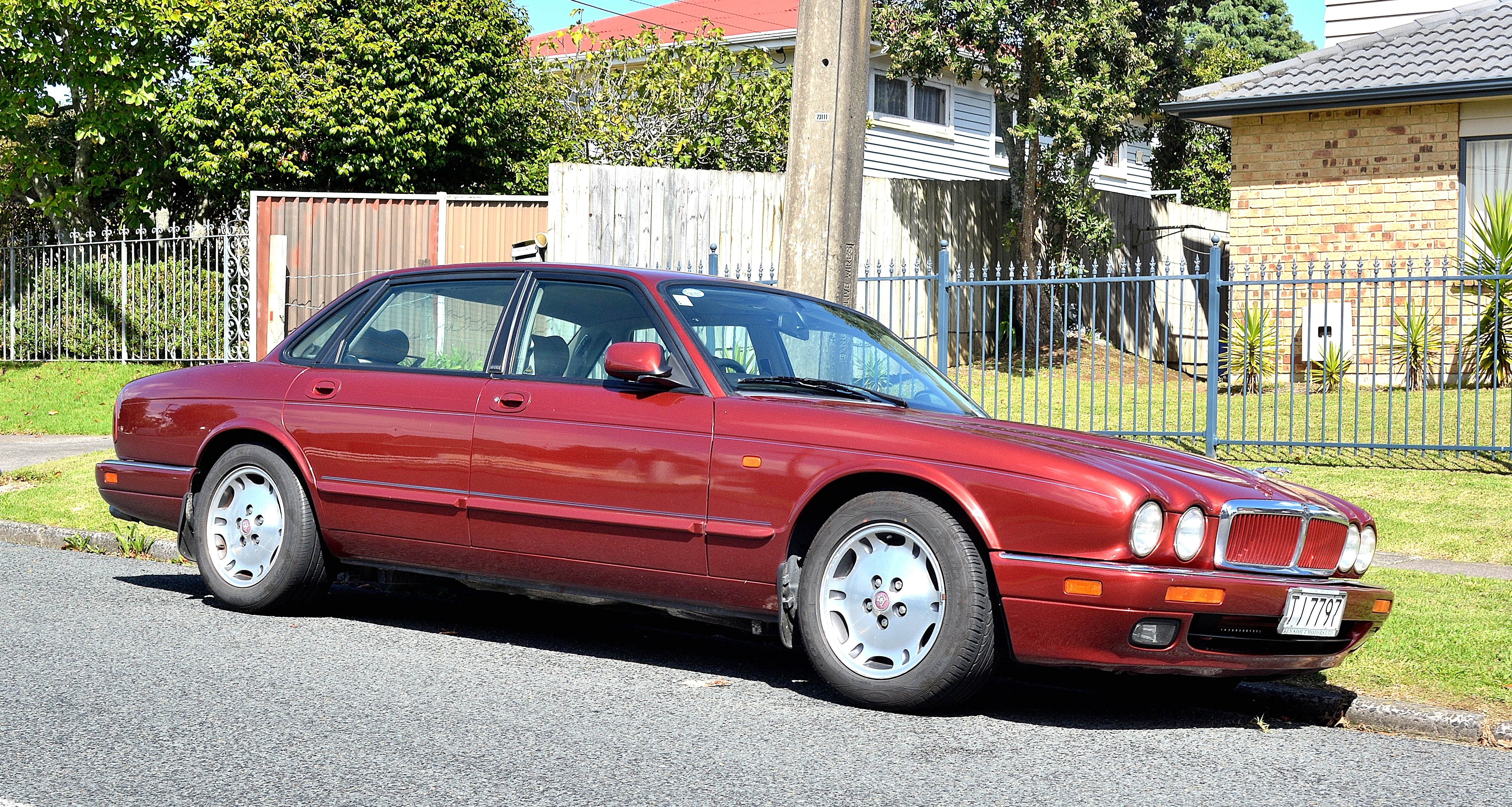 New Lynn,West Auckland.New Zealand